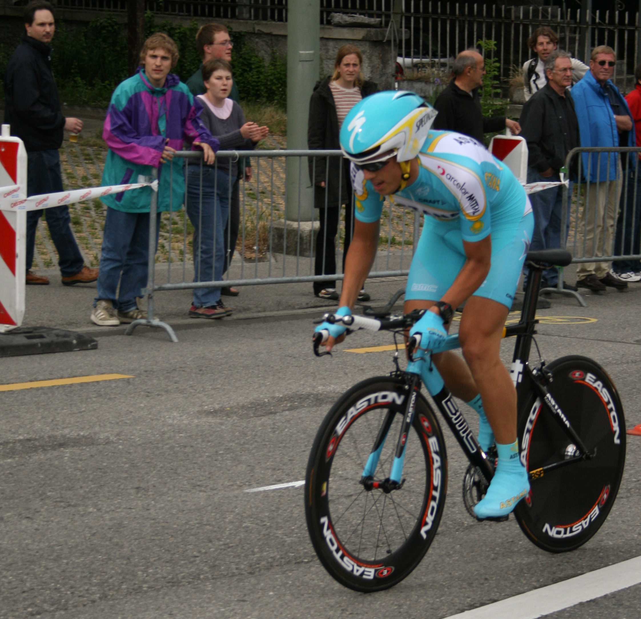 Steve Morabito prologue du Tour de Romandie 2007